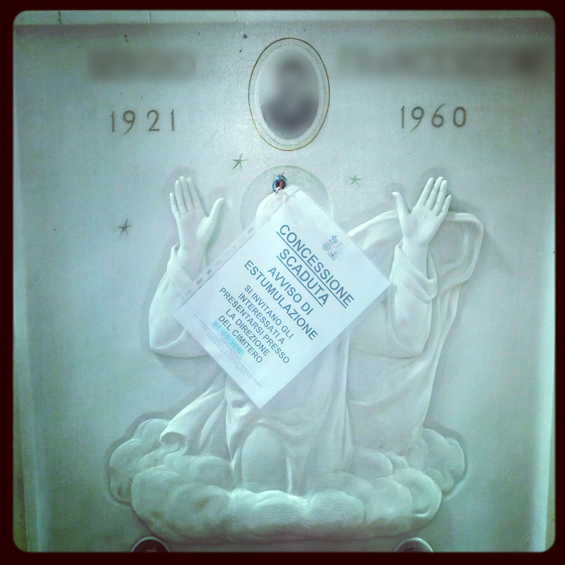 Viareggio, cimitero, 2012, 05 estumulazione